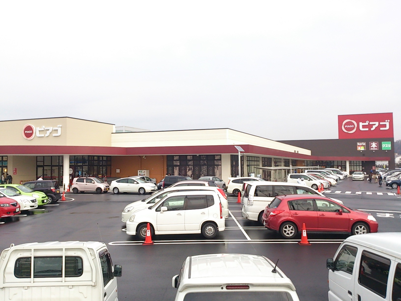 ピアゴ可児店（建替後）